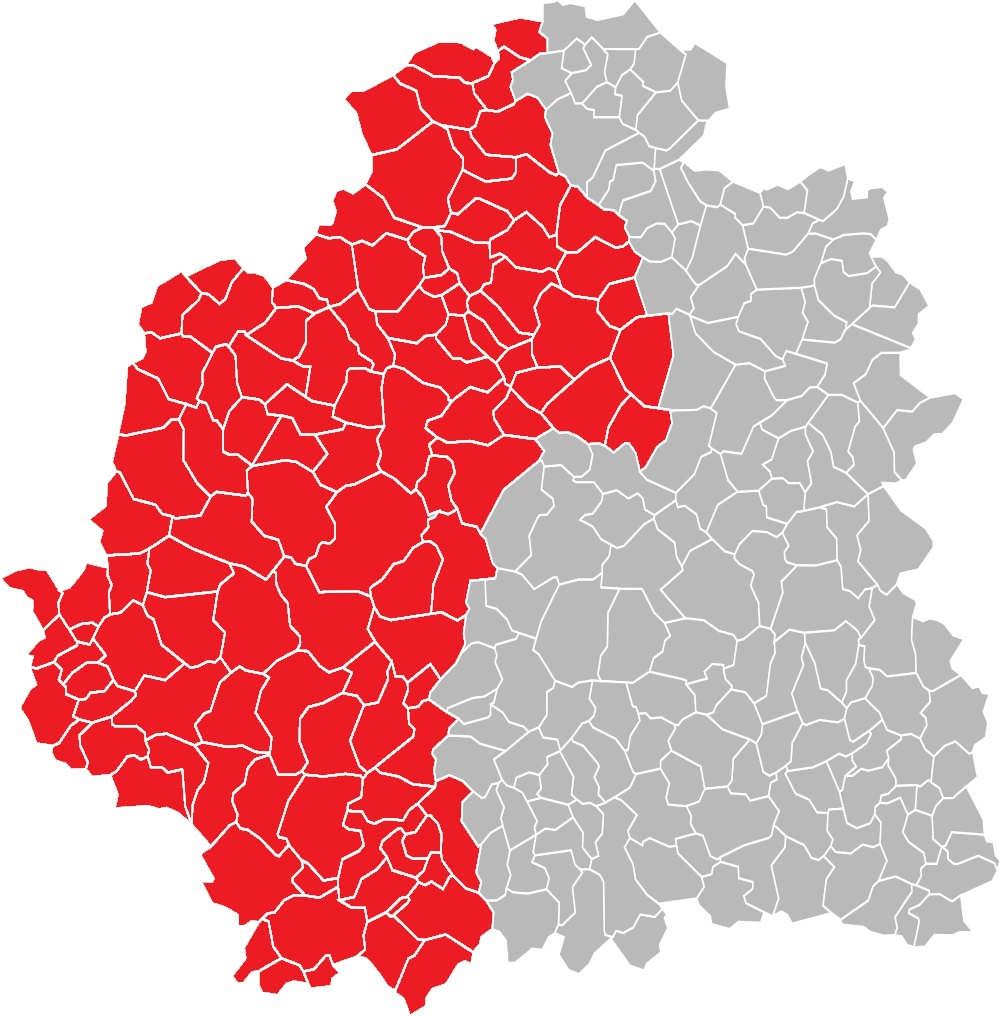 Carte des communes de l'Indre (36) : La troisième circonscription circonscriptions de 1988 à 2012.